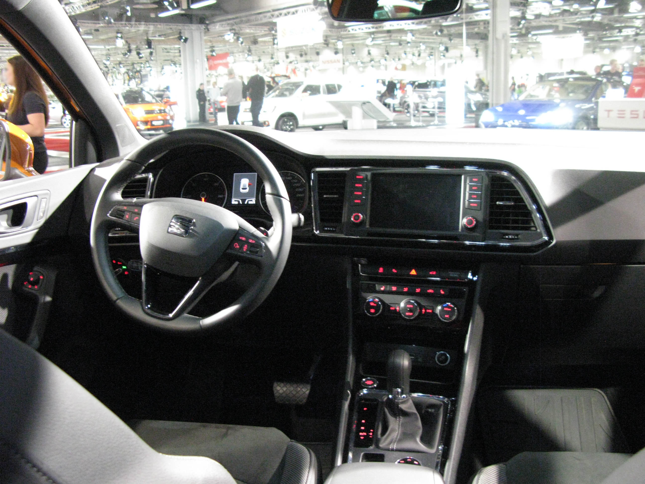 2017 Seat Ateca